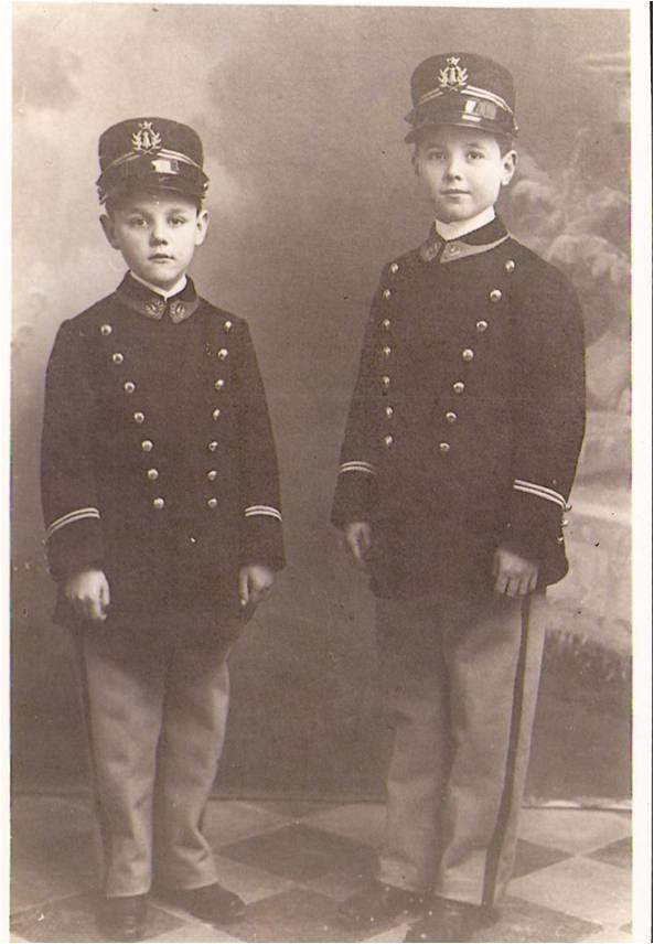 Hermanos Mario y Nolfo Vecchioli